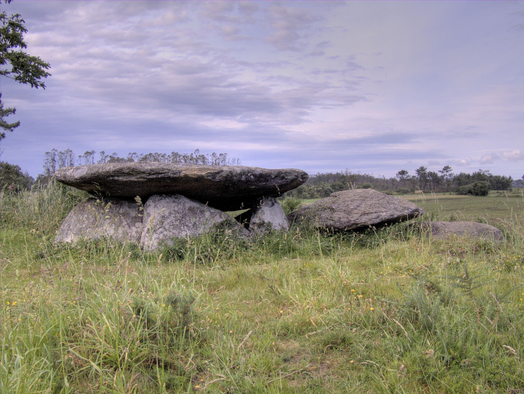 Dolmen da Pedra da Arca, Vimianzo